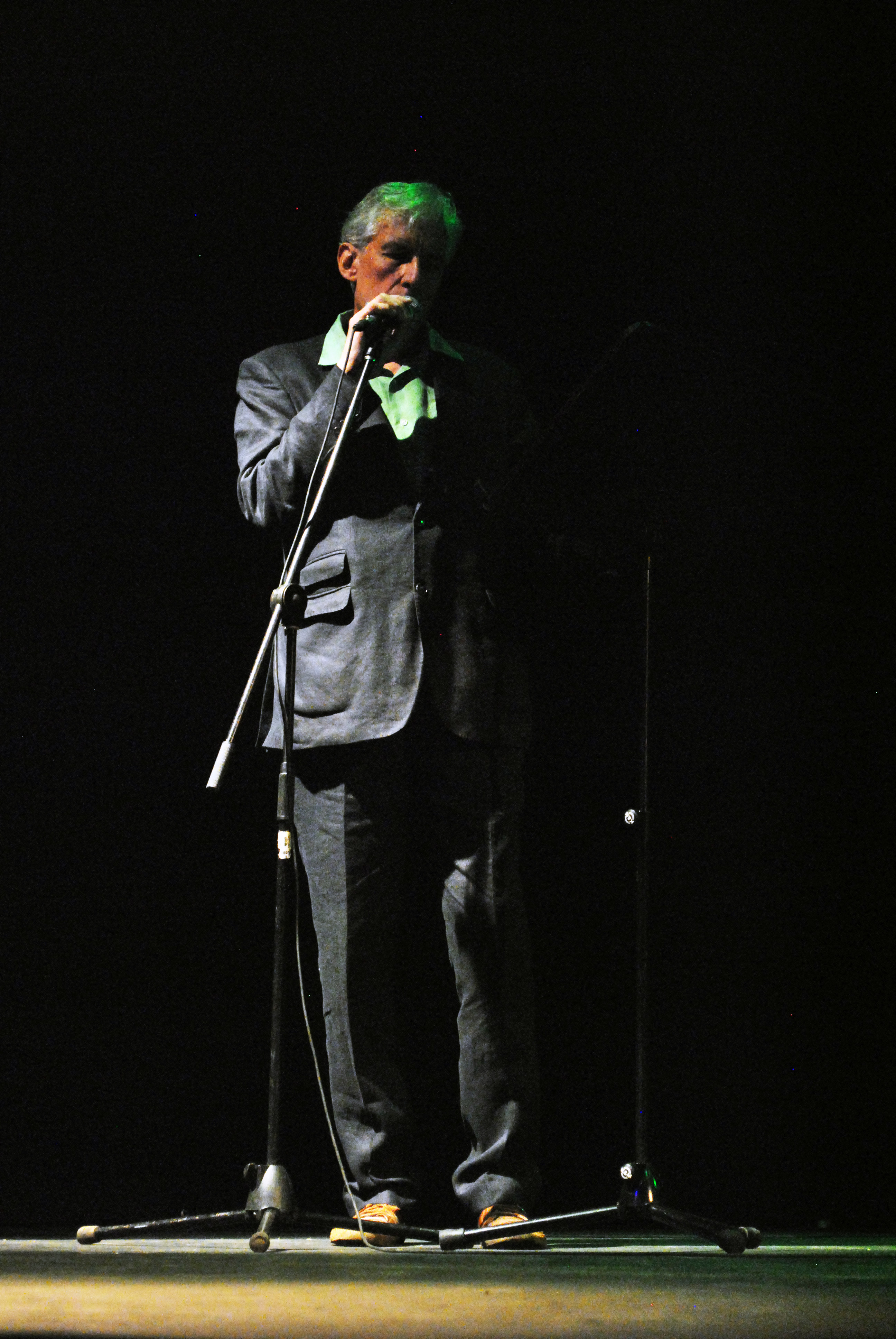 El poeta, músico y cineasta francés Michel Bulteau, leyendo "Mexico City Blues" de Jack Kerouac en el festival "Poesía en Voz Alta 2011", Casa del Lago, Ciudad de México